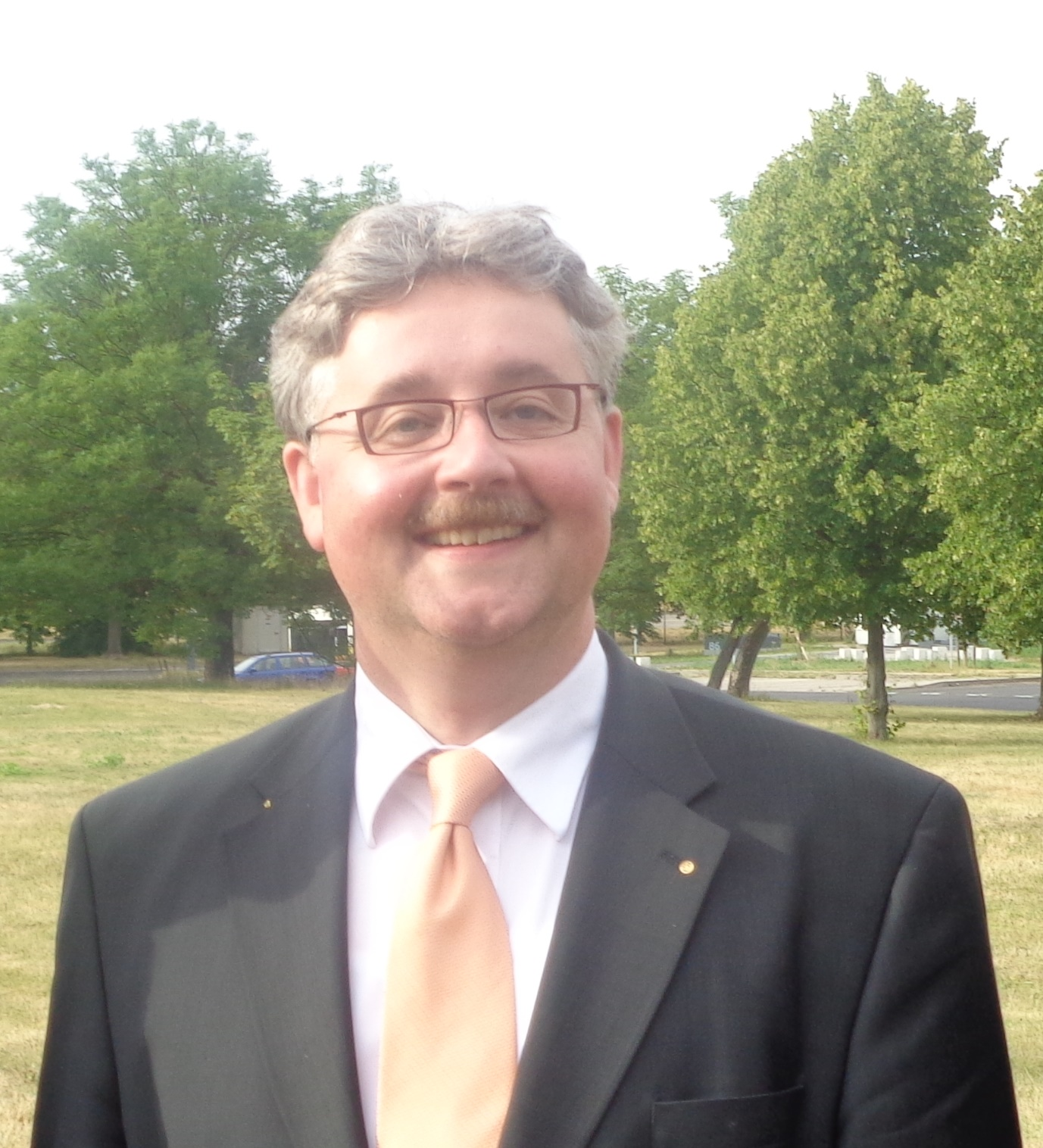 Porträtfotografie von Prof. Dr. phil. Matthias Stickler, Würzburg